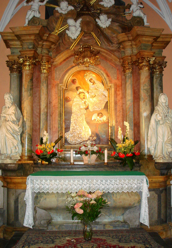 Częstochowa, zespół klasztorny paulinów na Jasnej Górze